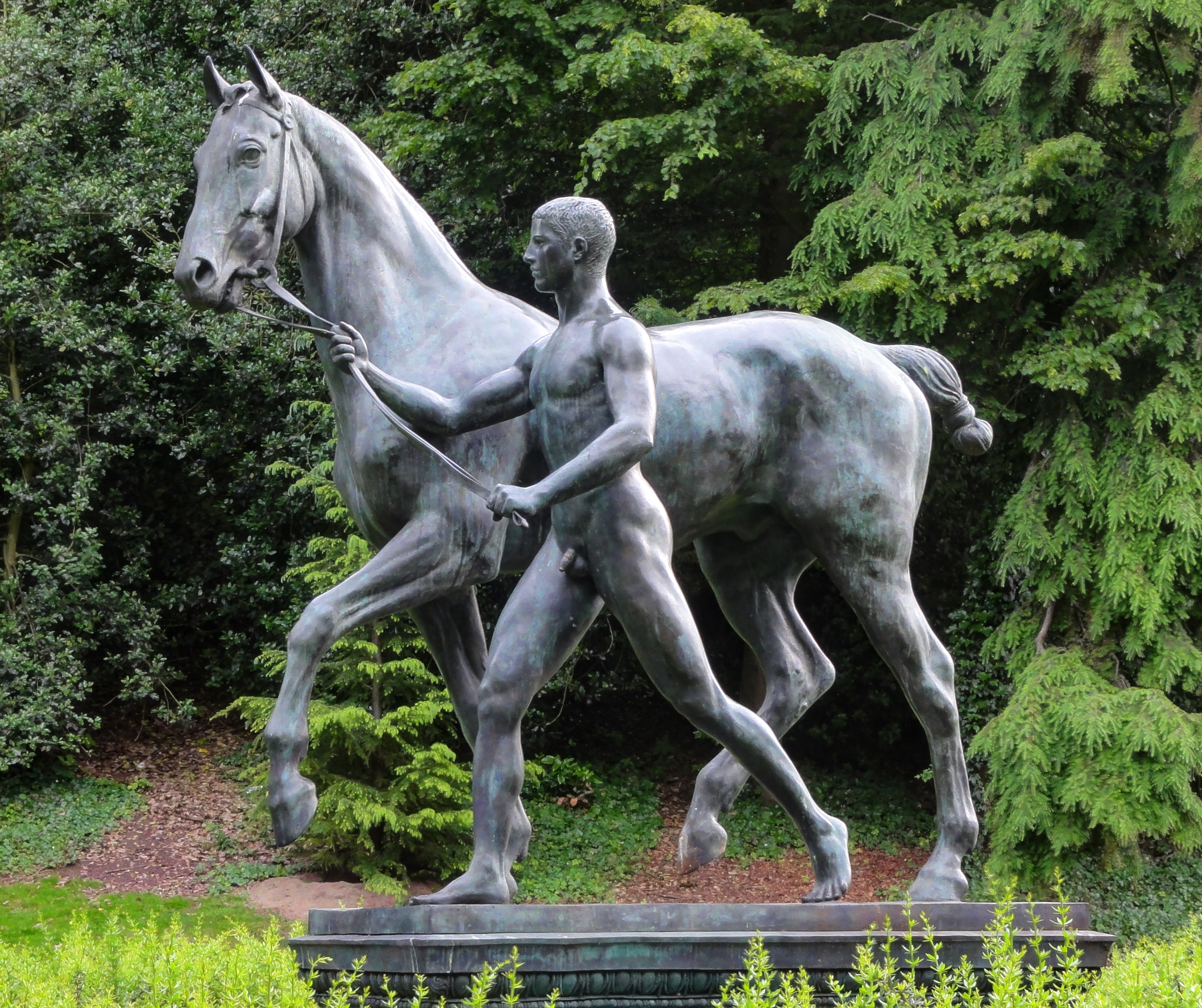 Rosselenker in Bremen, WallanlagenDas abgebildete Objekt ist ein geschütztes Kulturdenkmal in der Freien Hansestadt Bremen, mit der Nr. 1193,T004 beim Landesamt für Denkmalpflege registriert.